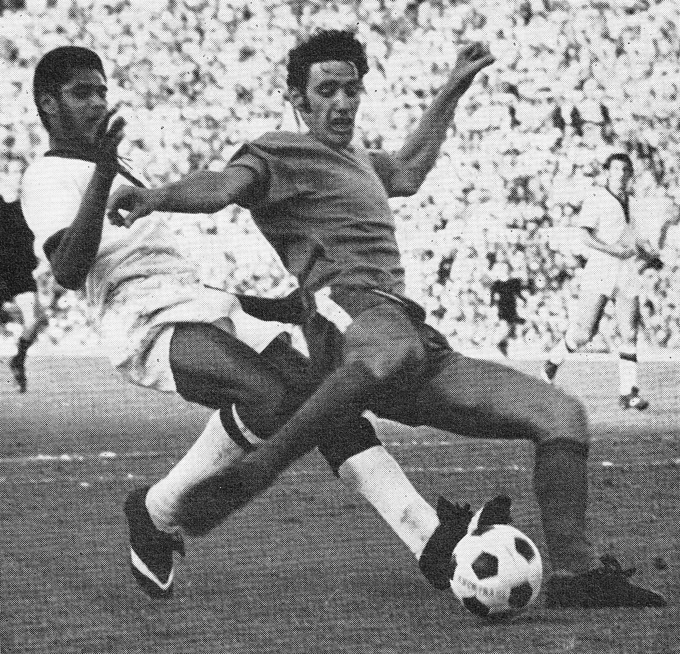 I calciatori Claudio Olinto de Carvalho "Nené" del Cagliari (a sinistra) e Giorgio Chinaglia della Lazio (a destra) in azione in una sfida del campionato italiano di Serie A.